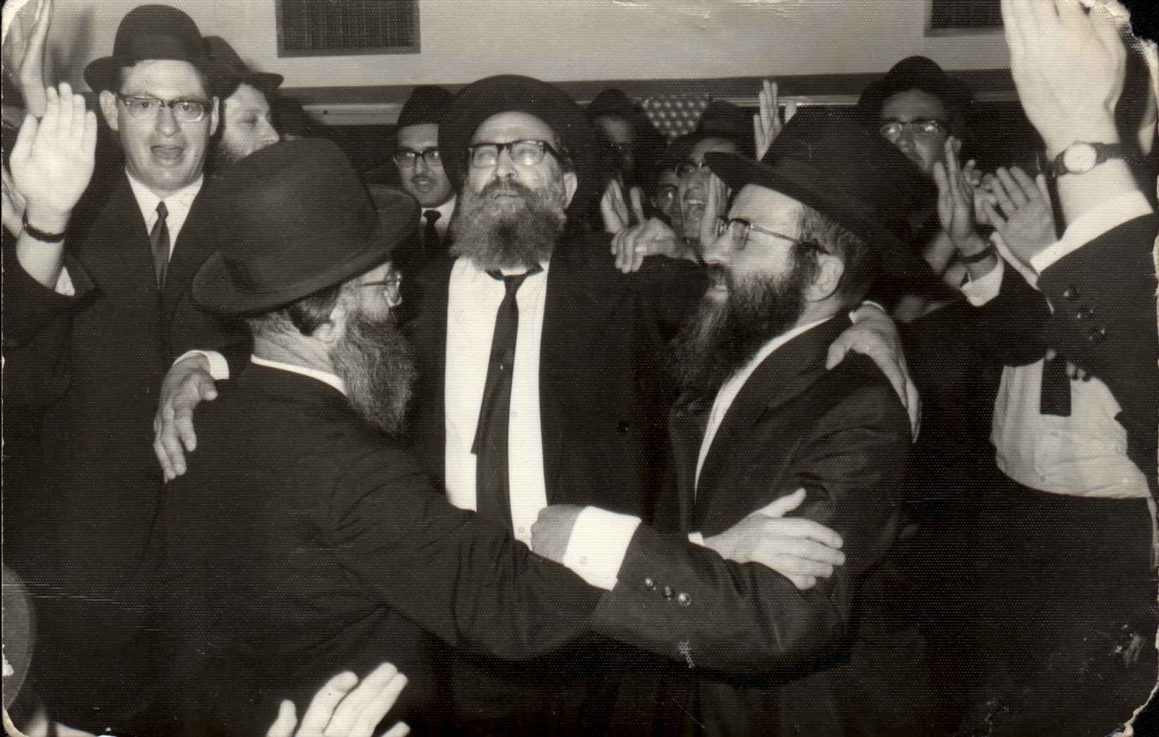 עם ידיד נפשו הרב משה שמואל שפירא